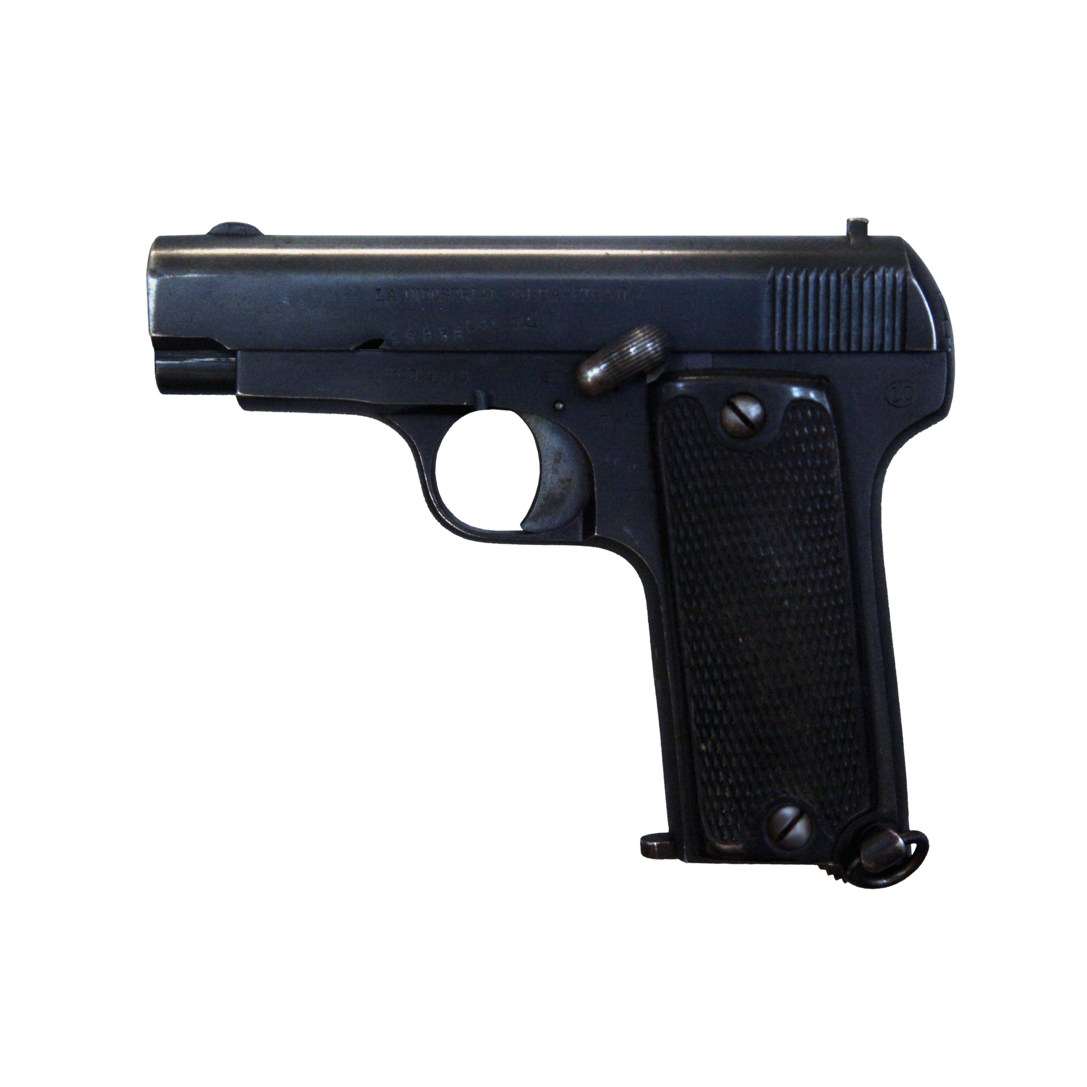 Ruby pistol, France, 1914. On display at Musée de l'Armée (Inv. 2001.45.1)